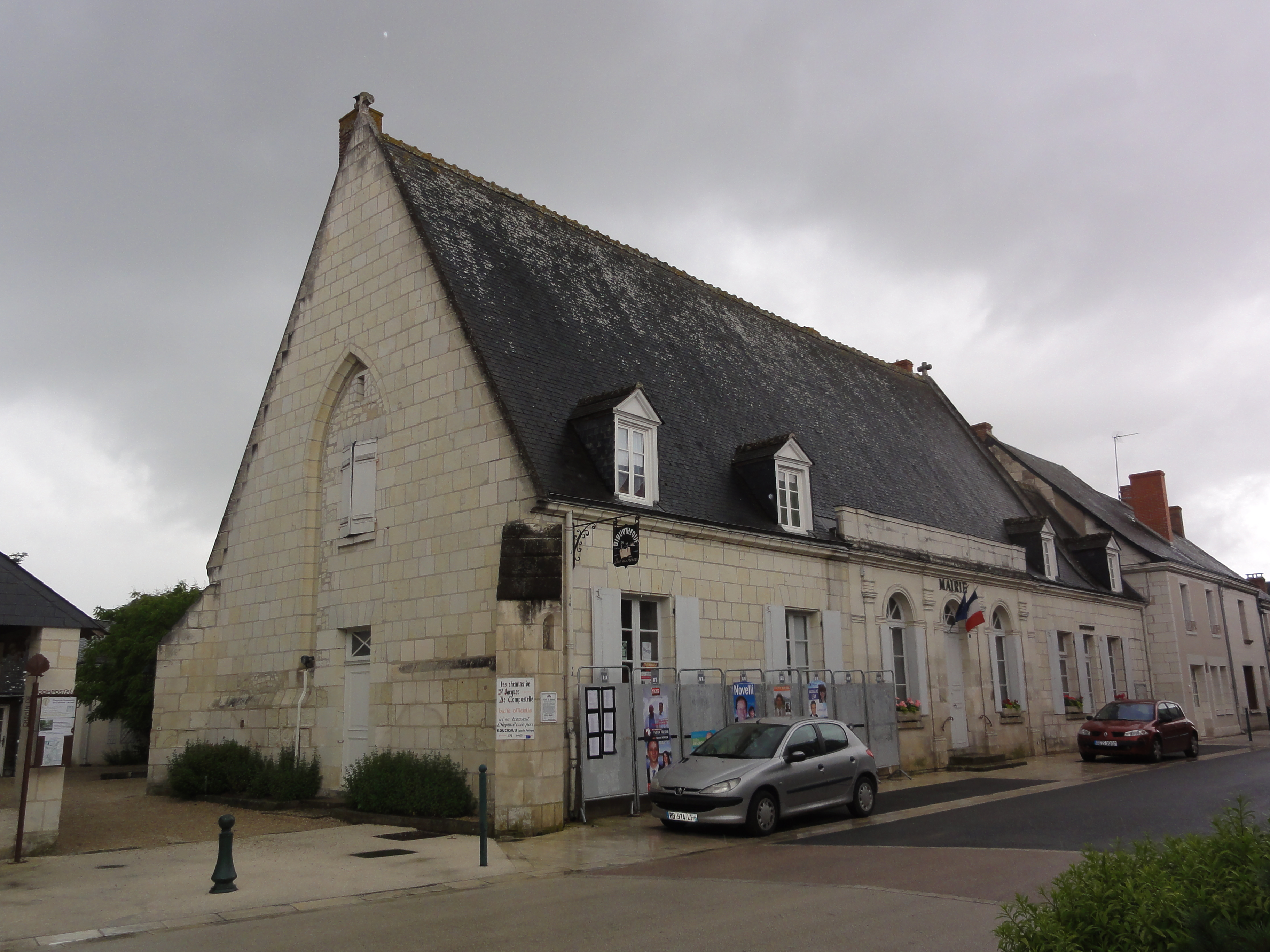 Sainte-Catherine-de-Fierbois (Indre-et-Loire) Mairie .